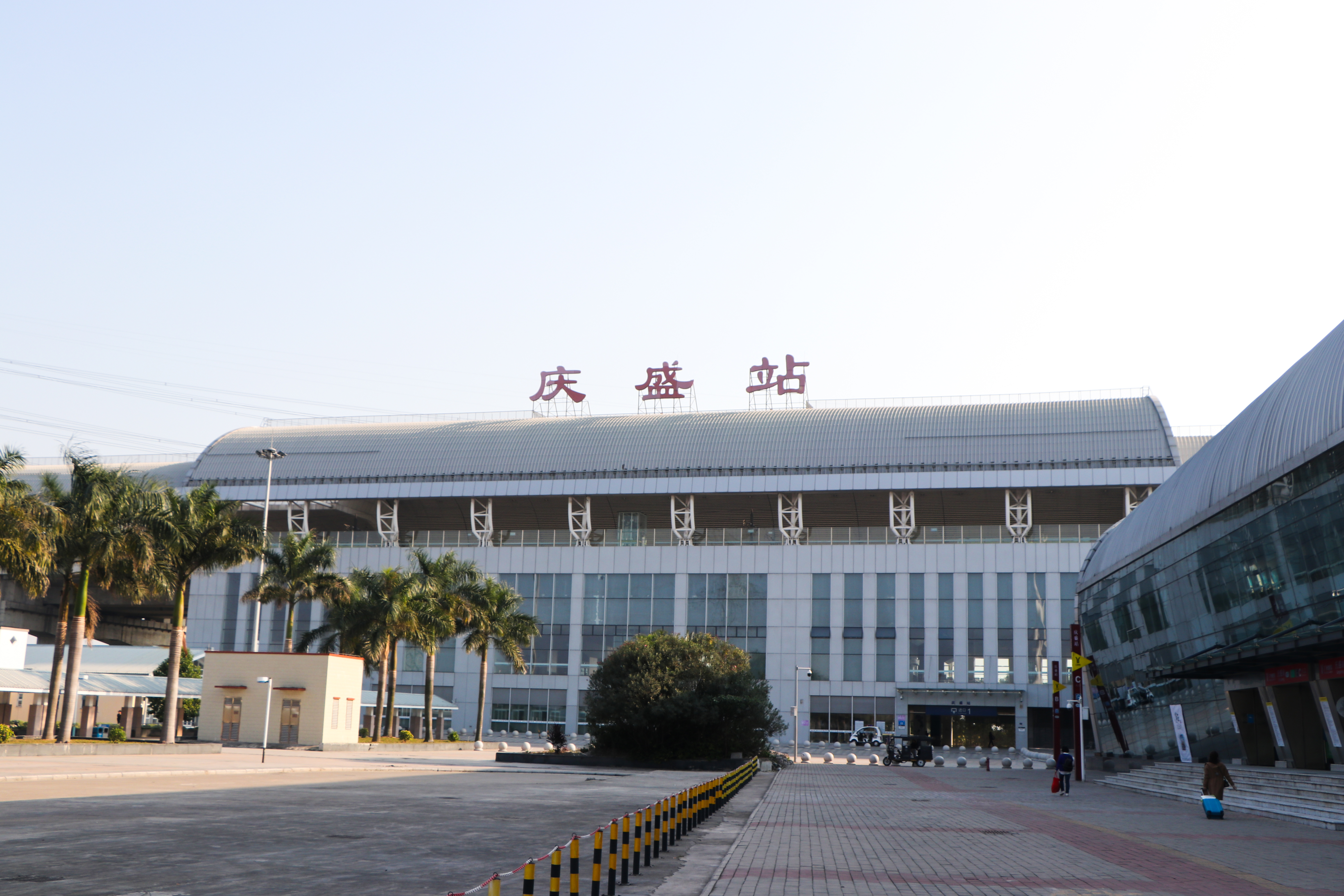 中国国铁庆盛站